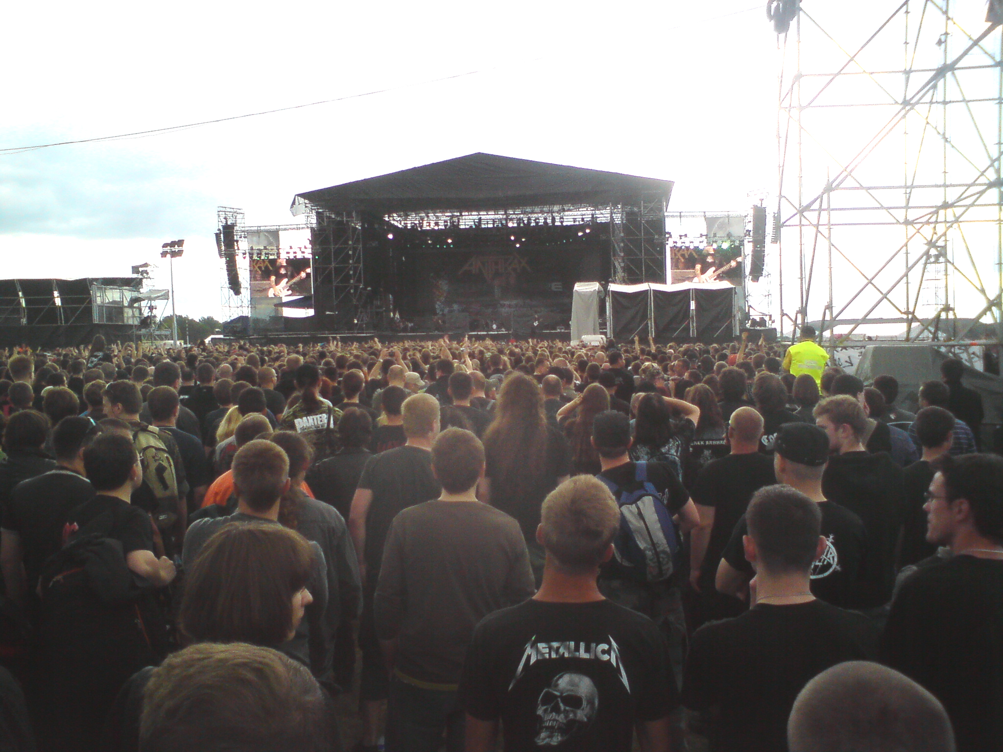 Koncert zespołu Anthrax na lotnisku Bemowo w Warszawie na Sonisphere Festival